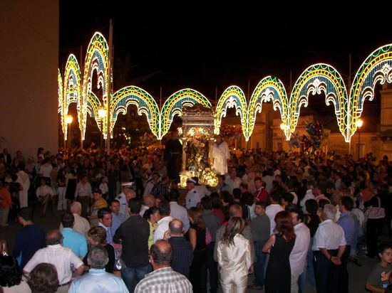 Descrizione: Santa Maria di Licodia, Festa Patronale di San Giuseppe; Autore e Fonte: Riccardo Spoto; Licenza d'uso